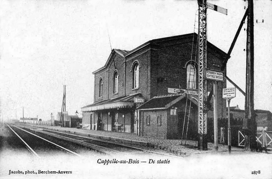 Le bâtiment voyageurs de la gare de Cappelle-au-Bois, ou Kapelle-op-den-Bos, vers 1900.